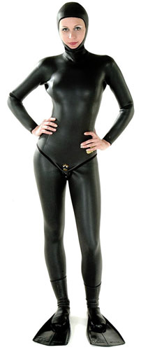 Гидрокостюм для фридайвинга Elios